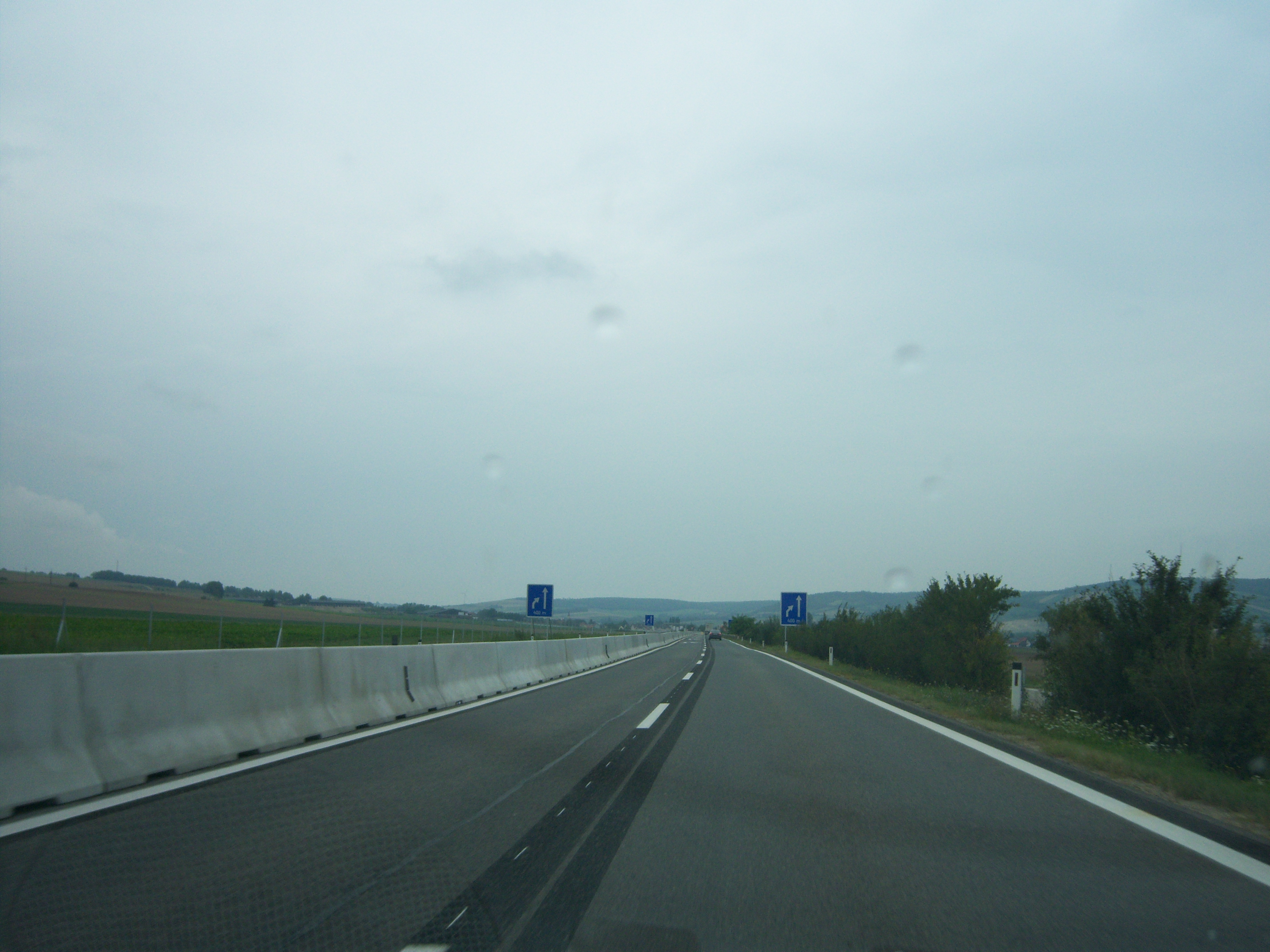 Weinviertel Schnellstraße S3